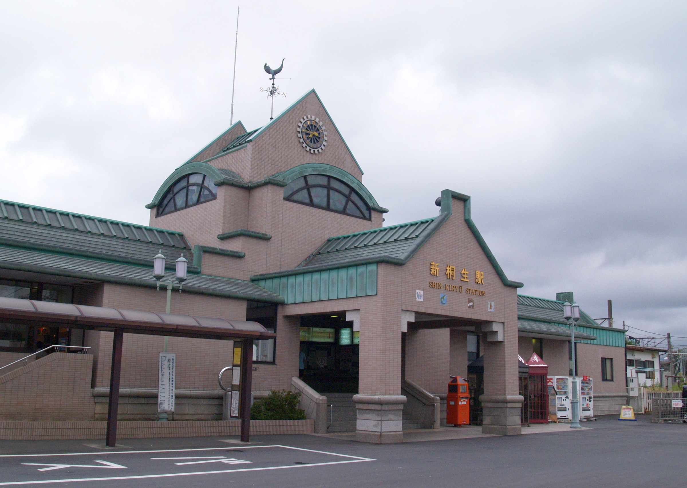 新桐生駅